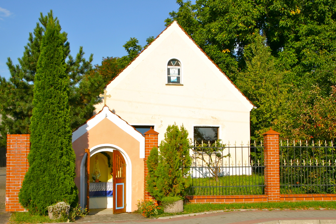 Lubrza (niem. Leuber) – wieś w Polsce położona w województwie opolskim, w powiecie prudnickim, w gminie Lubrza. Wieś jest siedzibą gminy Lubrza. Kapliczka przydrożna III (Wolności 75).